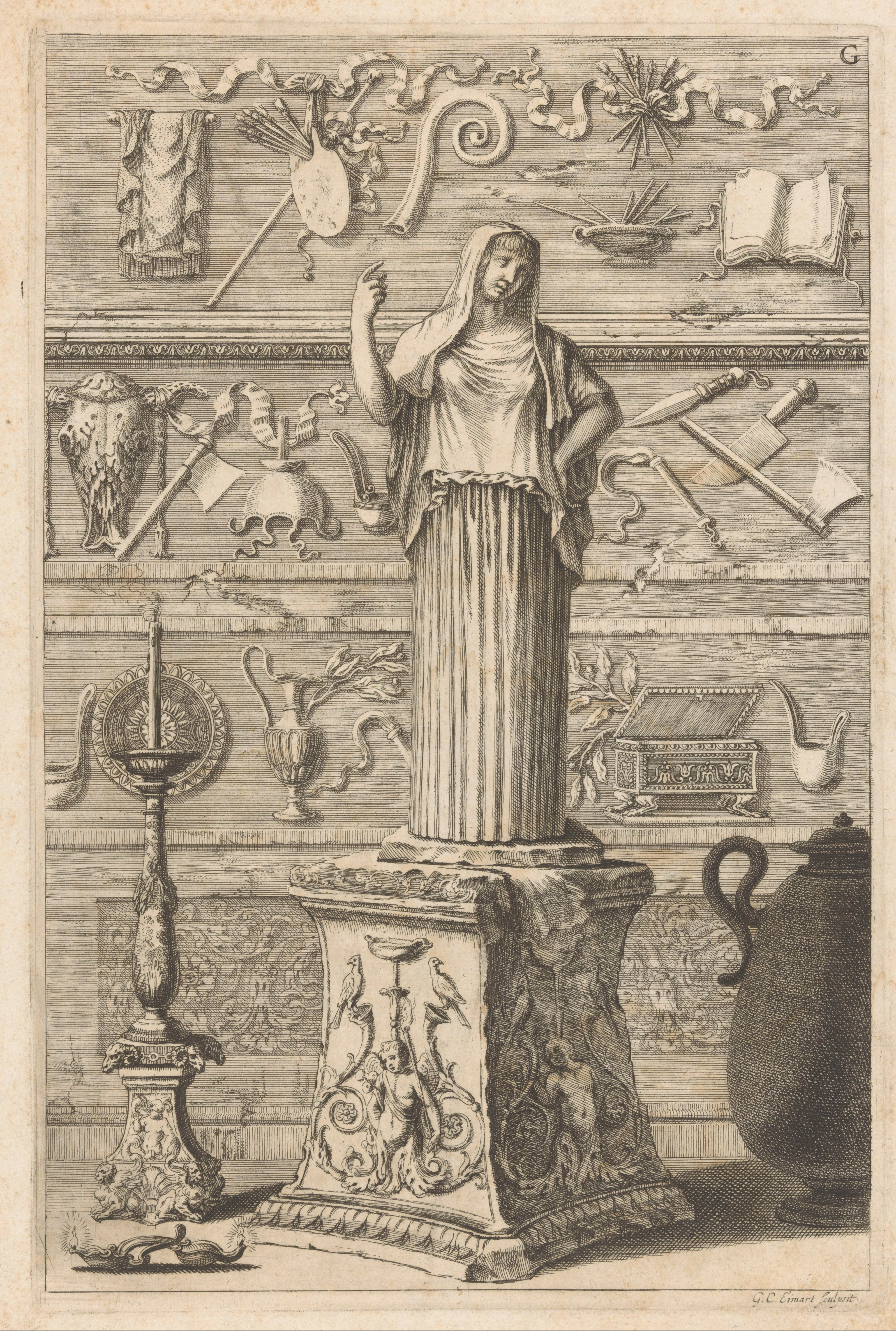 IdentificatieTitel(s): Romeinse fragmenten met beeld Hestia GiustinianiTeutsche Akademie (serietitel)Objecttype: prent ornamentprent boekillustratie Objectnummer: RP-P-1998-5Opschriften / Merken: verzamelaarsmerk, verso, gestempeld: Lugt 2228Omschrijving: Een verzameling van offerobjecten met in het midden de sculptuur 'Hestia Giustiniani' op een voetstuk. Links daarvan een kandelaber, rechts een pot of vaas. Rechts boven G genummerd.VervaardigingVervaardiger: prentmaker: Georg Christoph Eimart jr. (vermeld op object)uitgever: Jakob von SandrartPlaats vervaardiging: prentmaker: Duitslanduitgever: NeurenbergDatering: in of voor 1675Fysieke kenmerken: etsMateriaal: papier Techniek: etsenAfmetingen: plaatrand: h 320 mm × b 212 mmToelichtingPrent uit: Sandrart, Joachim. Der Teutsche Academie. Neurenberg: Sandrart, Jakob von, 1675.OnderwerpWat: (story of) Vesta (Hestia)piece of sculpture, reproduction of a piece of sculptureVerwerving en rechtenCredit line: Aankoop uit het F.G. Waller-FondsVerwerving: aankoop 1998Copyright: Publiek domein